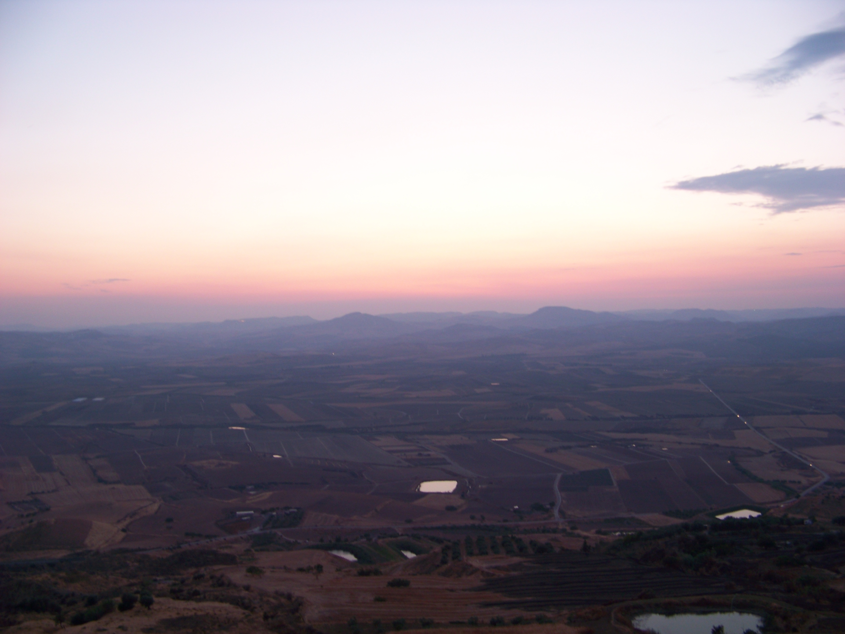 Vista della Piana di Gela.